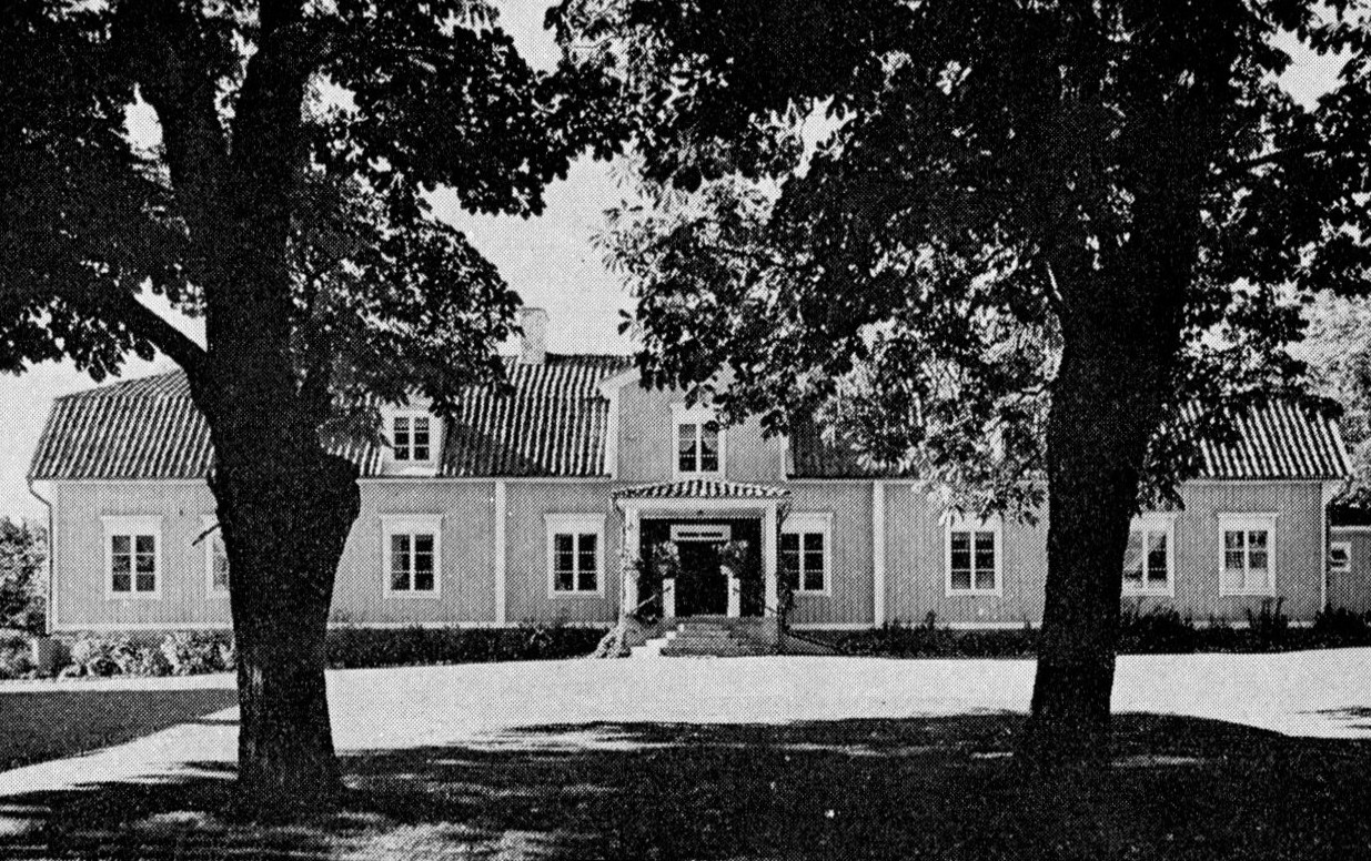 Torsvi gårds huvudbyggnad